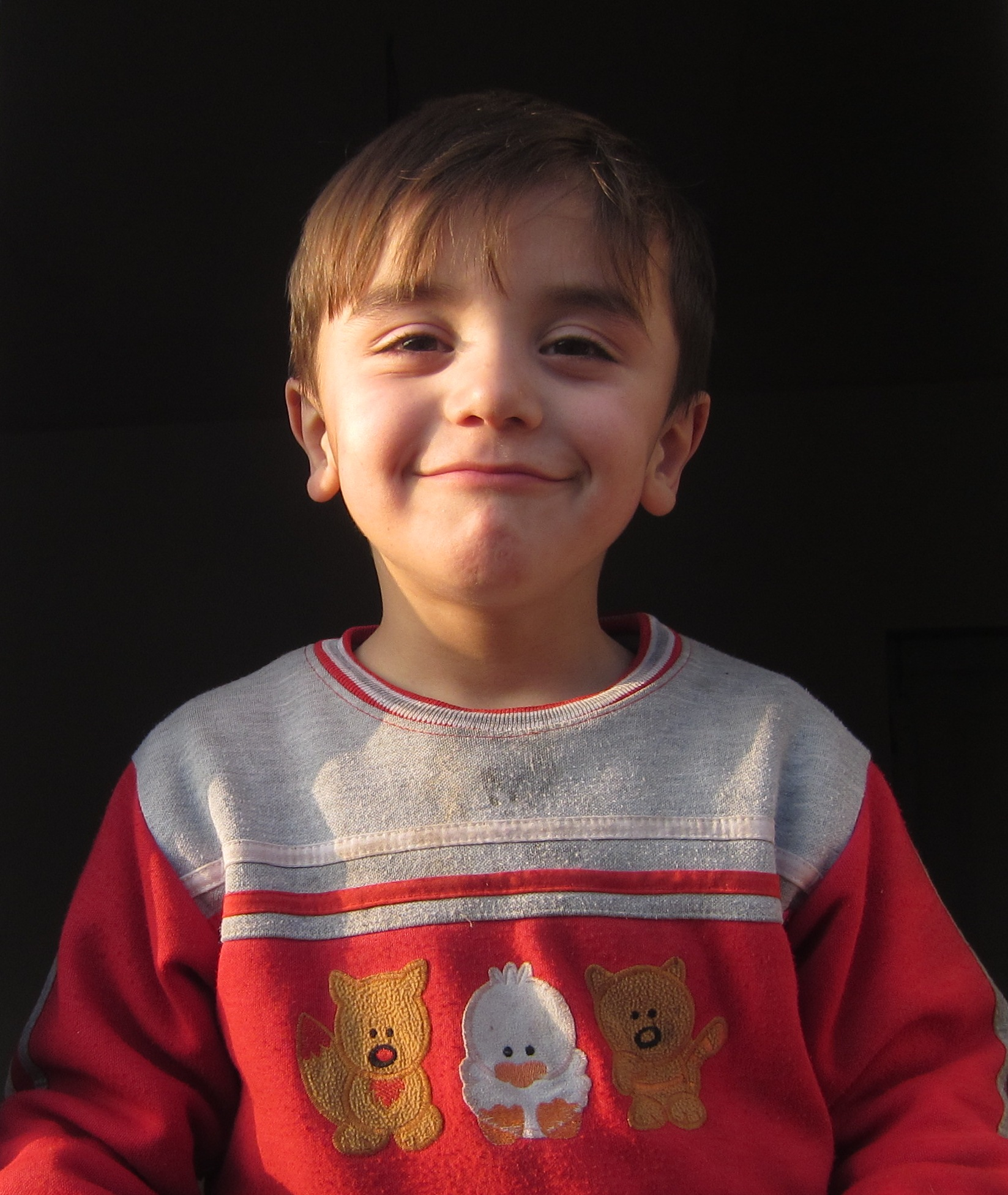 Azərbaycanın Qum kəndindən olan Saxur uşaq